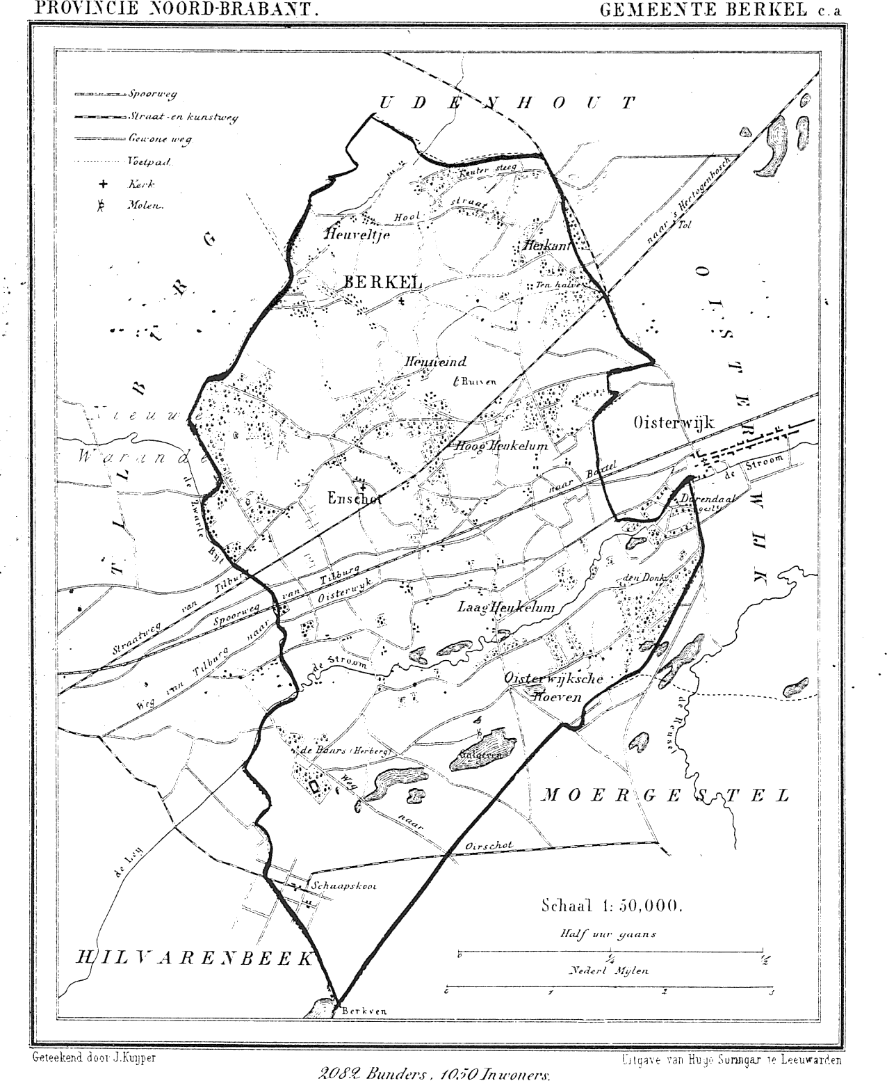 Nederland, Noord-Brabant, Gemeente Berkel-Enschot